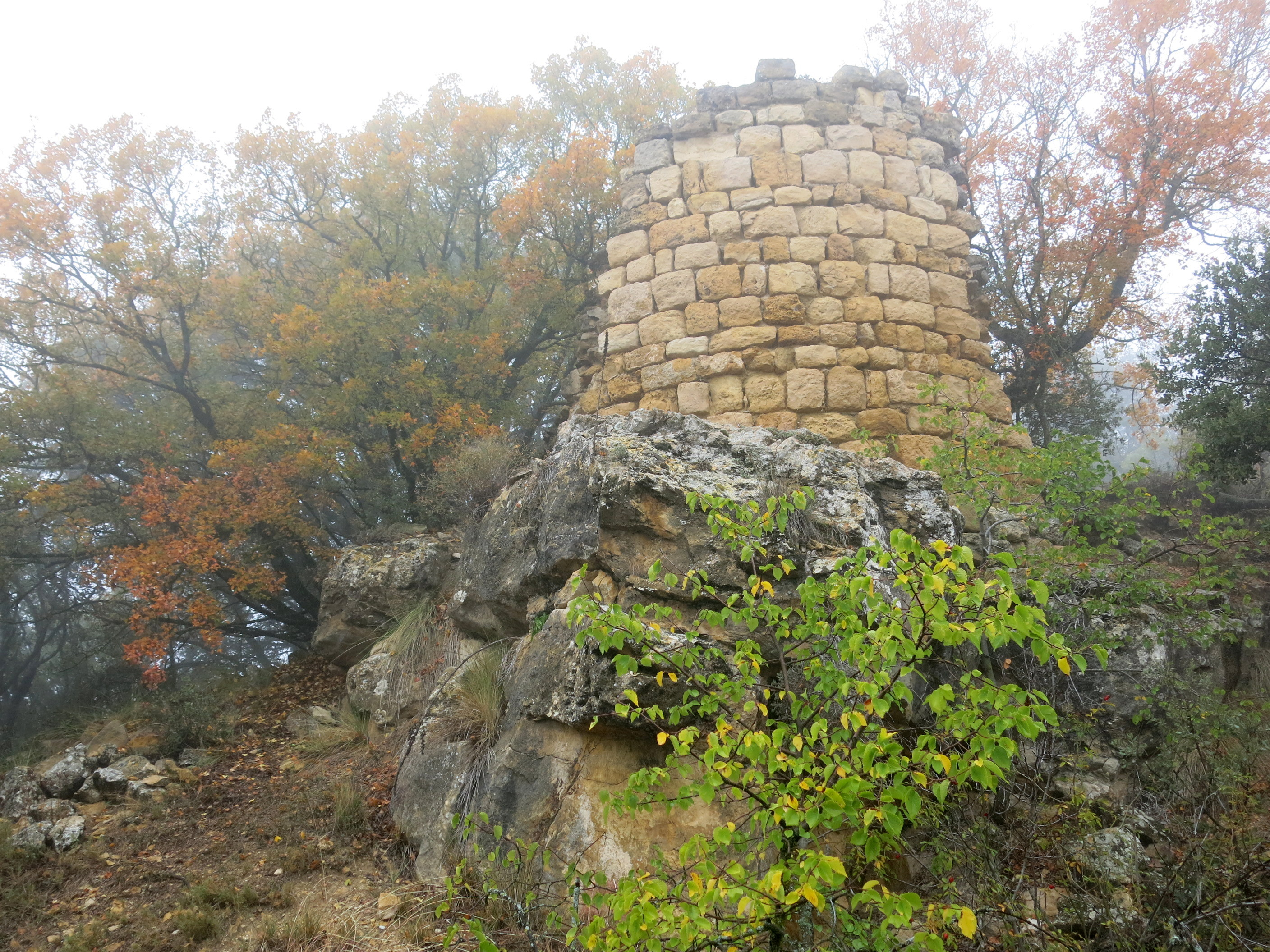 Torres de Cas ( Àger) a la Noguera - Catalunya